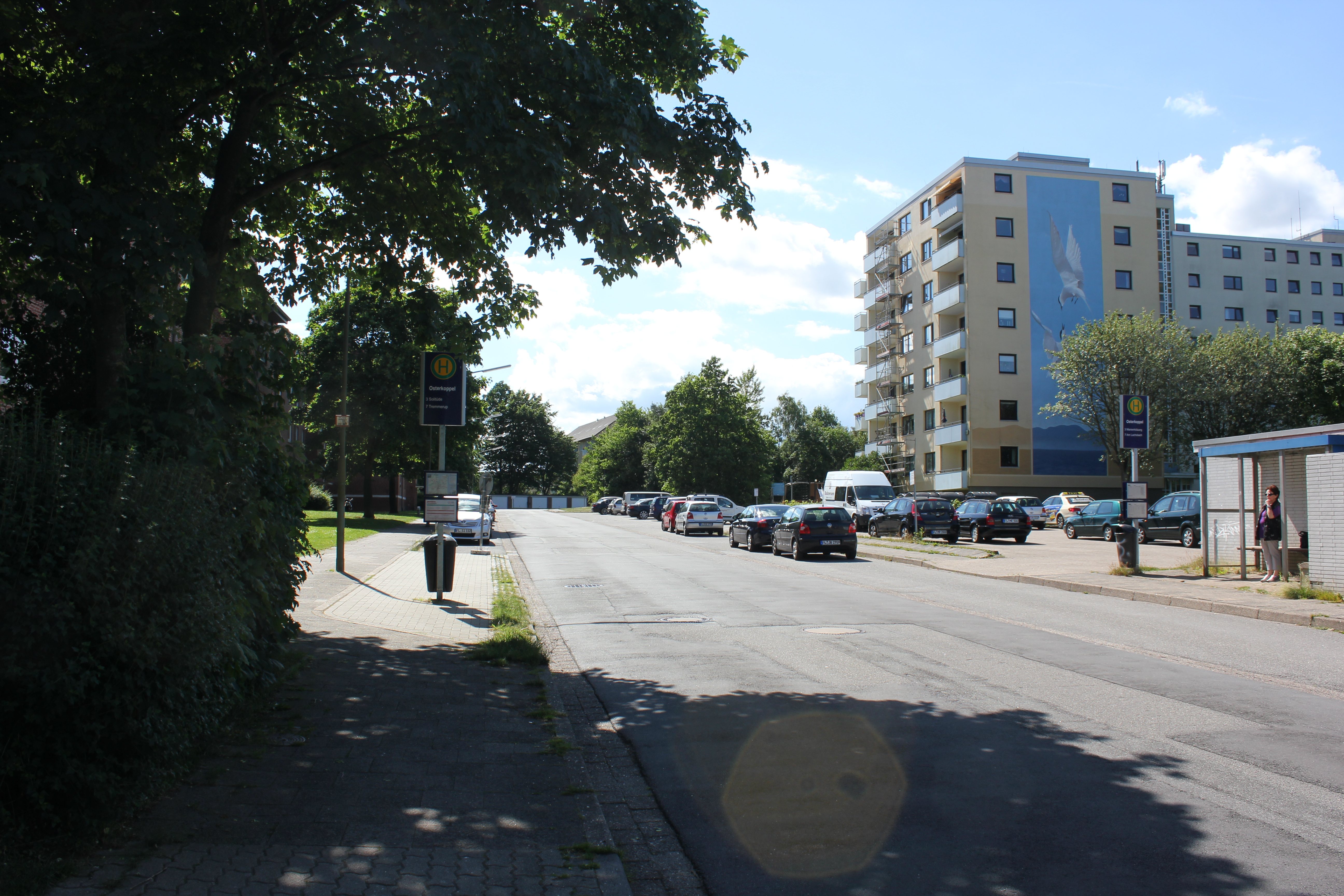 Osterkoppel im Juni 2014 (Flensburg-Mürwik)